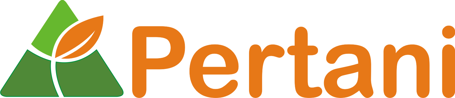 Logo Terbaru PT Pertani (Persero)